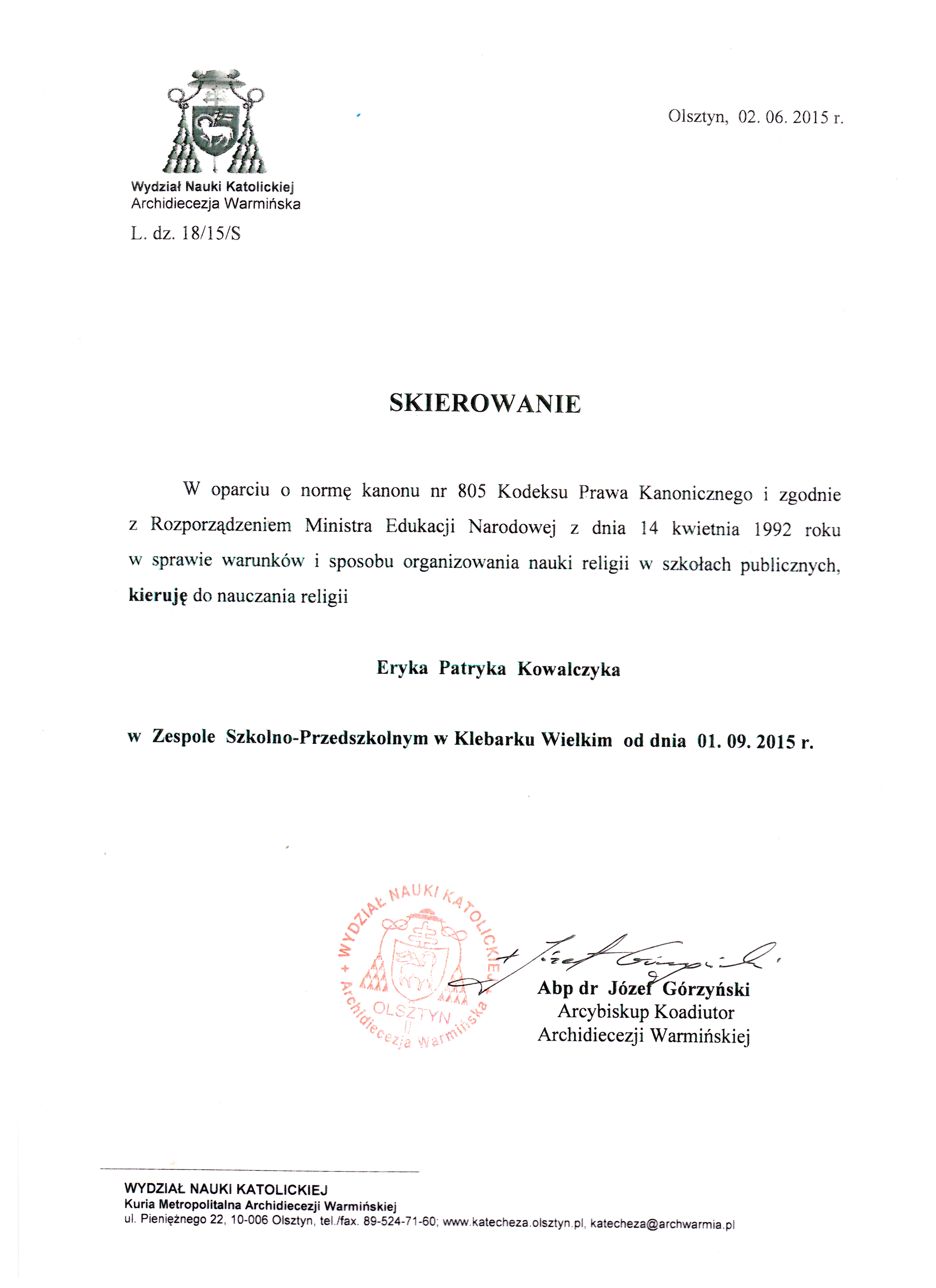 przykład imiennego skierowania